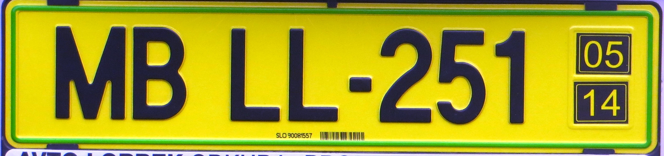 Export kenteken Slovenië